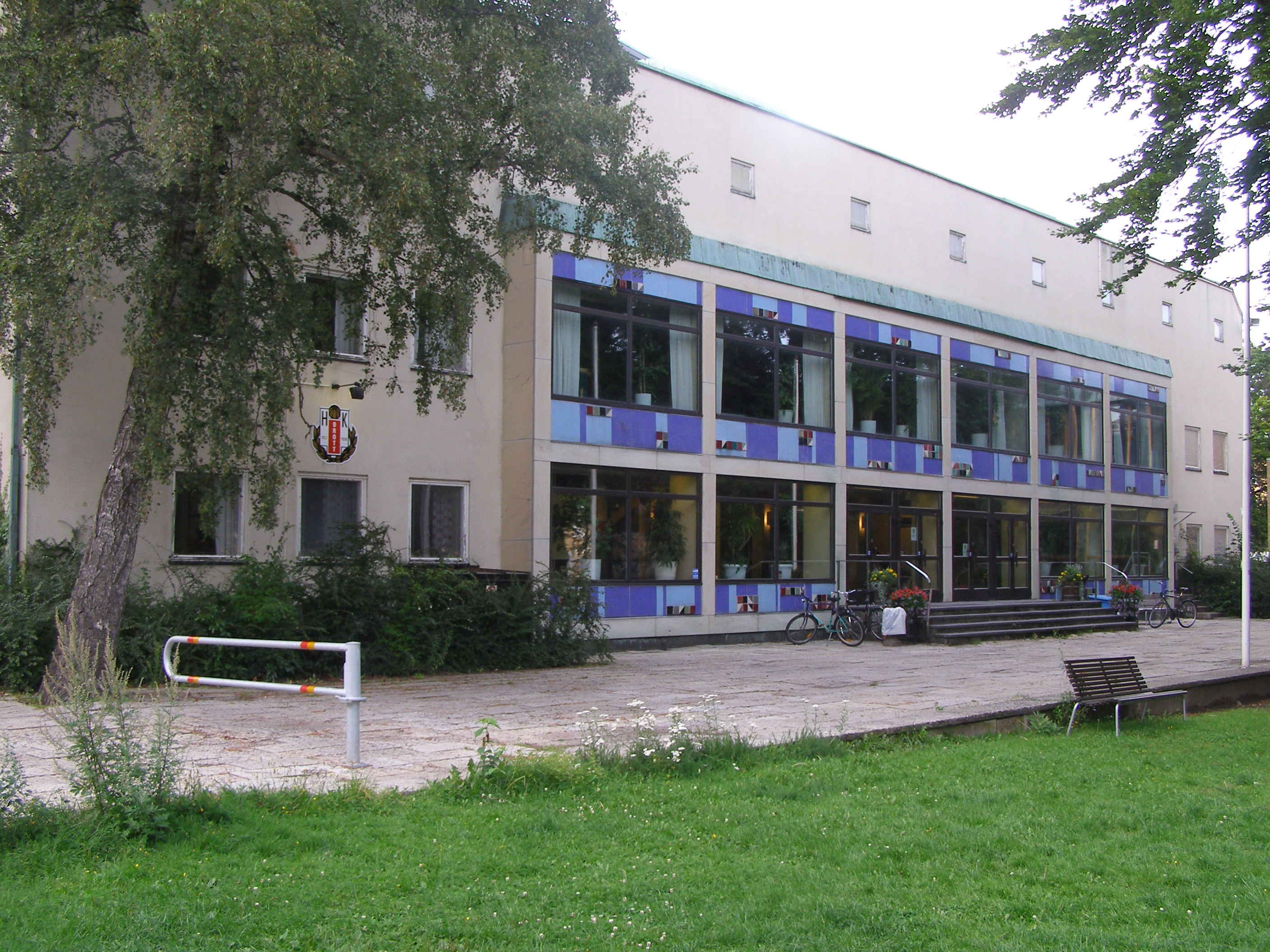 Halmstads sporthall, här spelar bland annat HK Drott och Halmstad BTK.